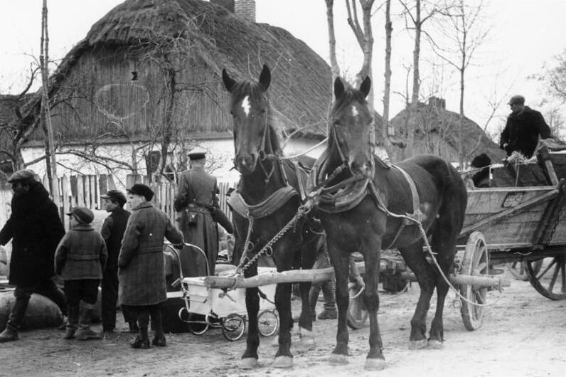 Wartheland, Ansiedlung deutscher Bauern aus Ostpolen, Mai 1940